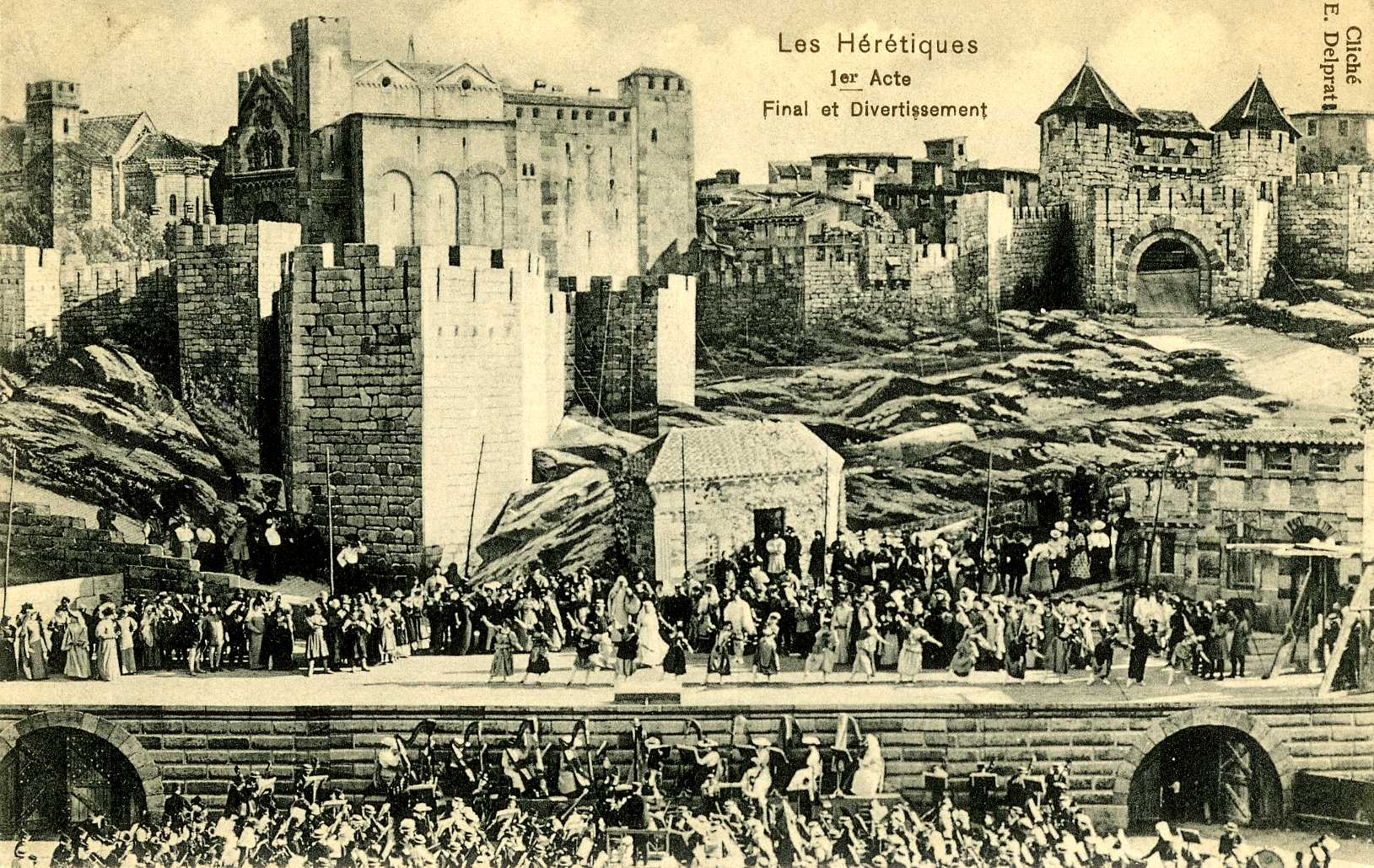 Carte postale éditée en 1905 lors de la représentation de l'opéra Les Hérétiques de Charles Gaston Levadé au Théâtre des Arènes, à Béziers.